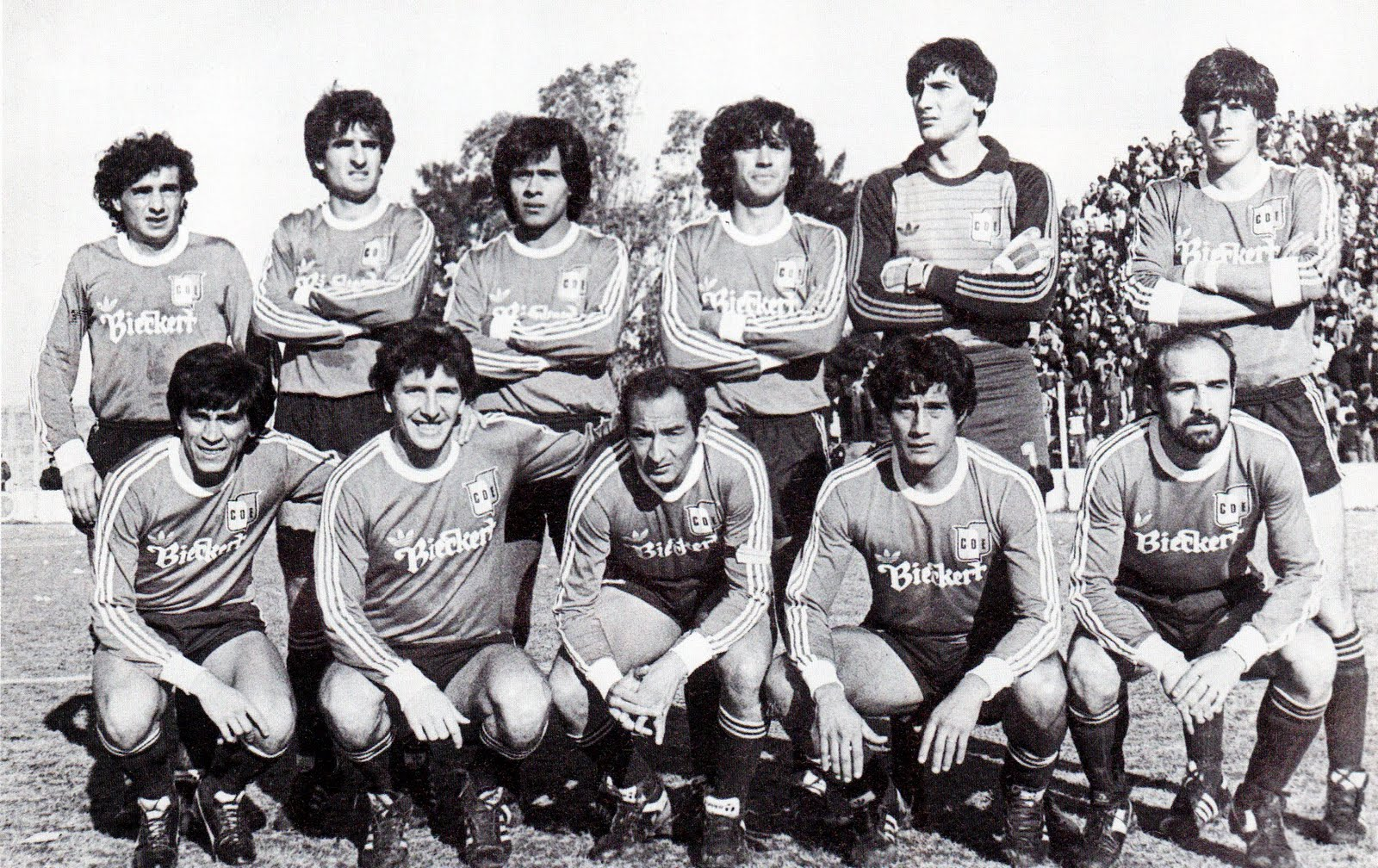 Deportivo Español 1984